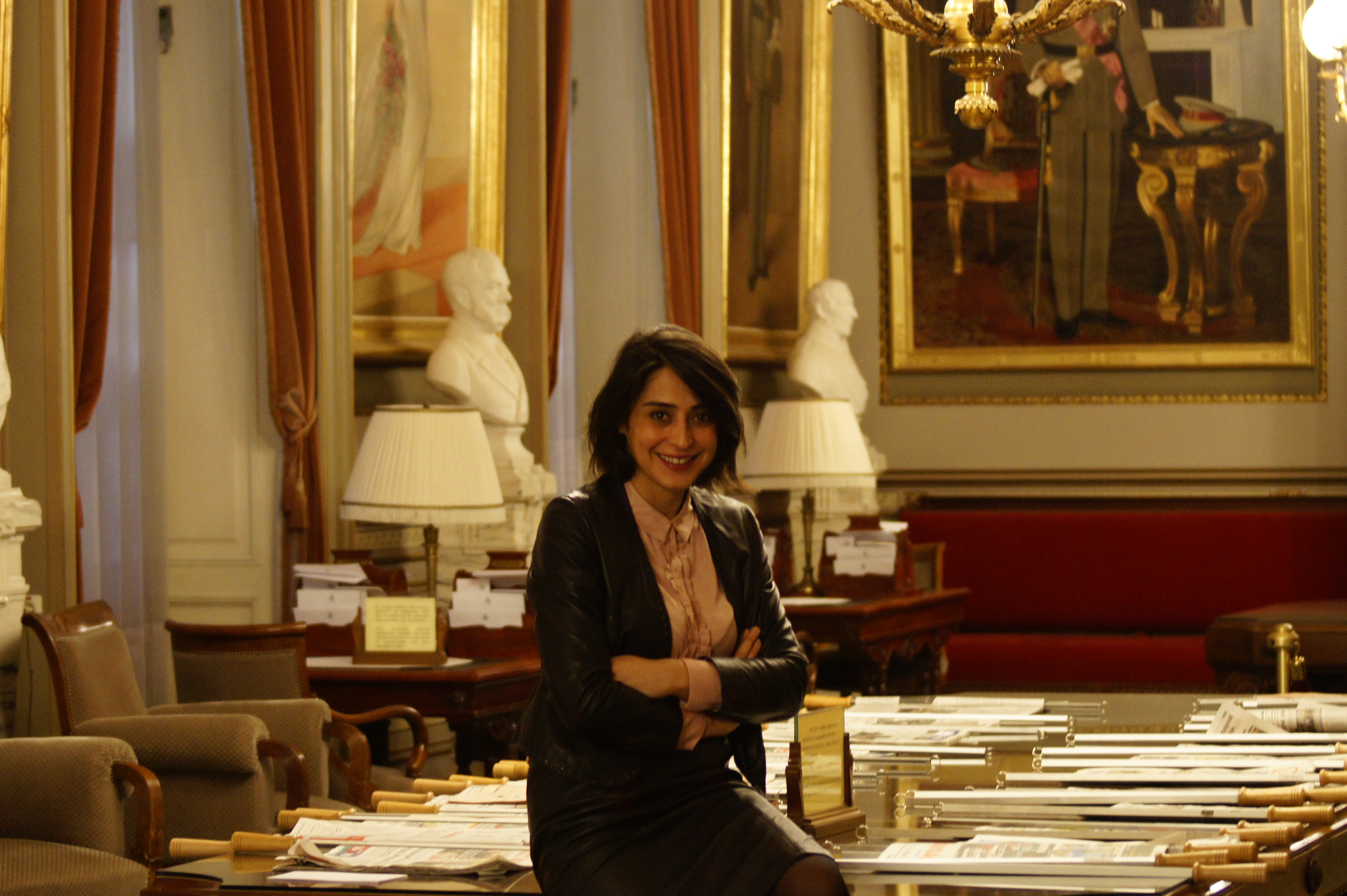 Özlem au Parlement fédéral. Salle de lecture.